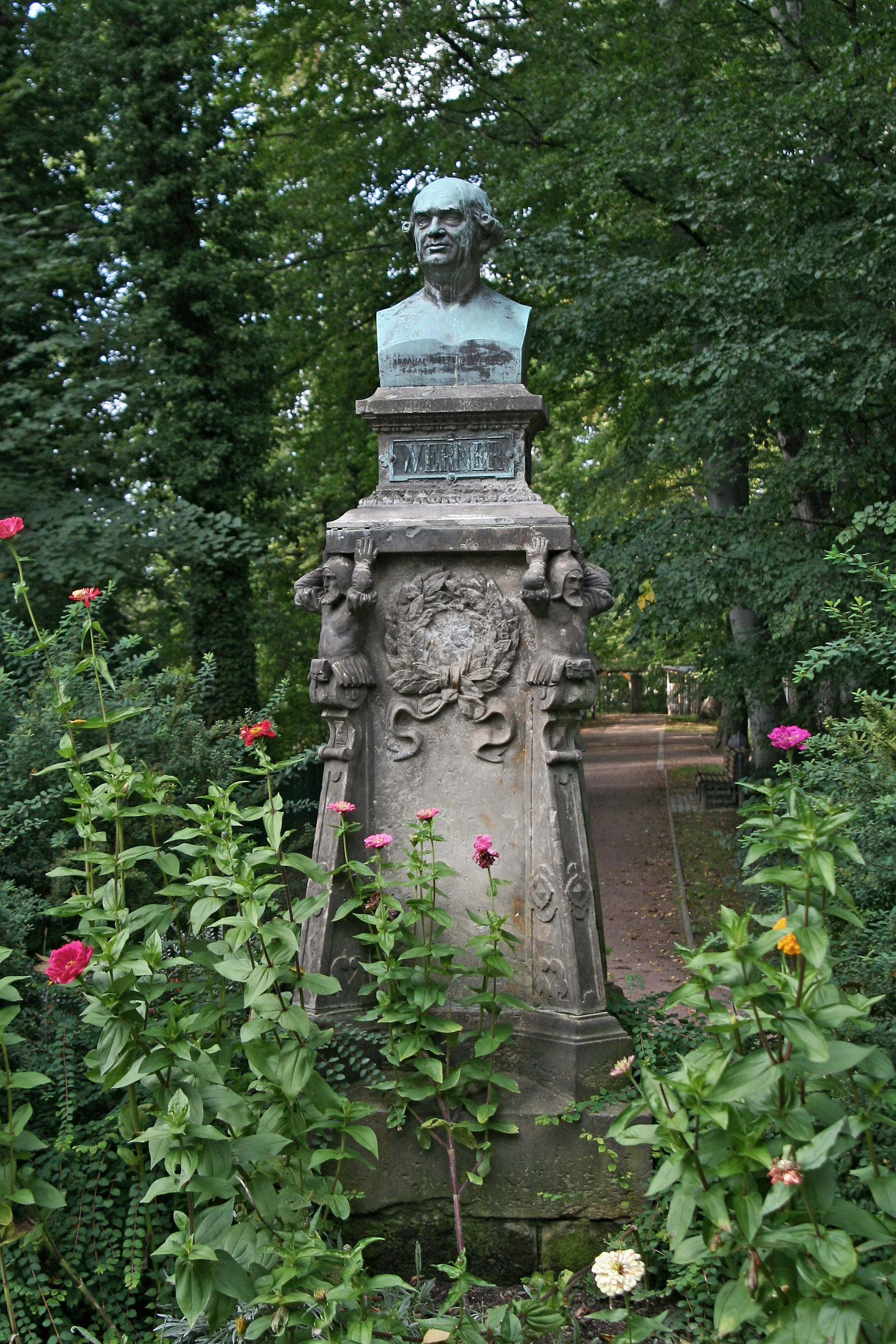 Abraham Gottlob Werner, Monument